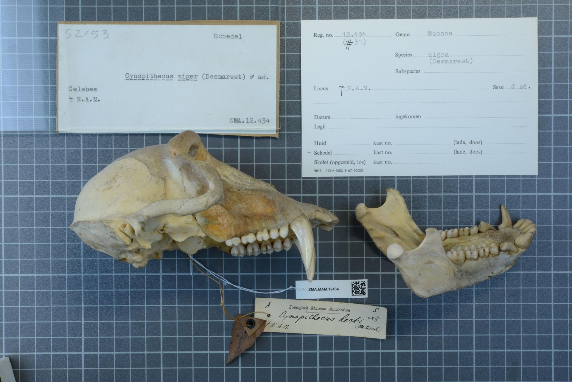 Macaca nigra Desmarest